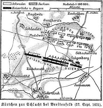 Kärtchen zur Schlacht bei Breitenfeld